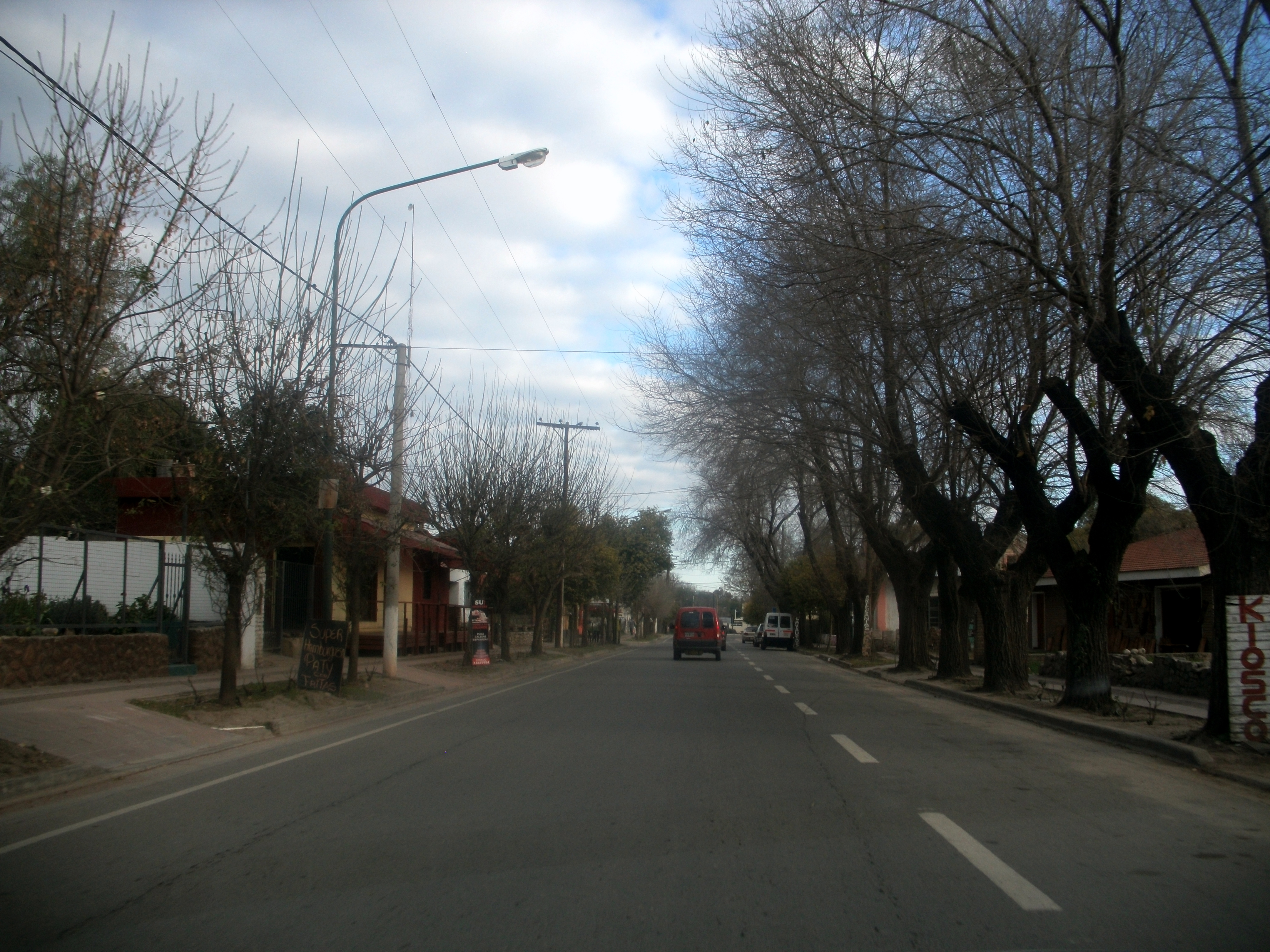 La ruta hace de calle del Pueblo